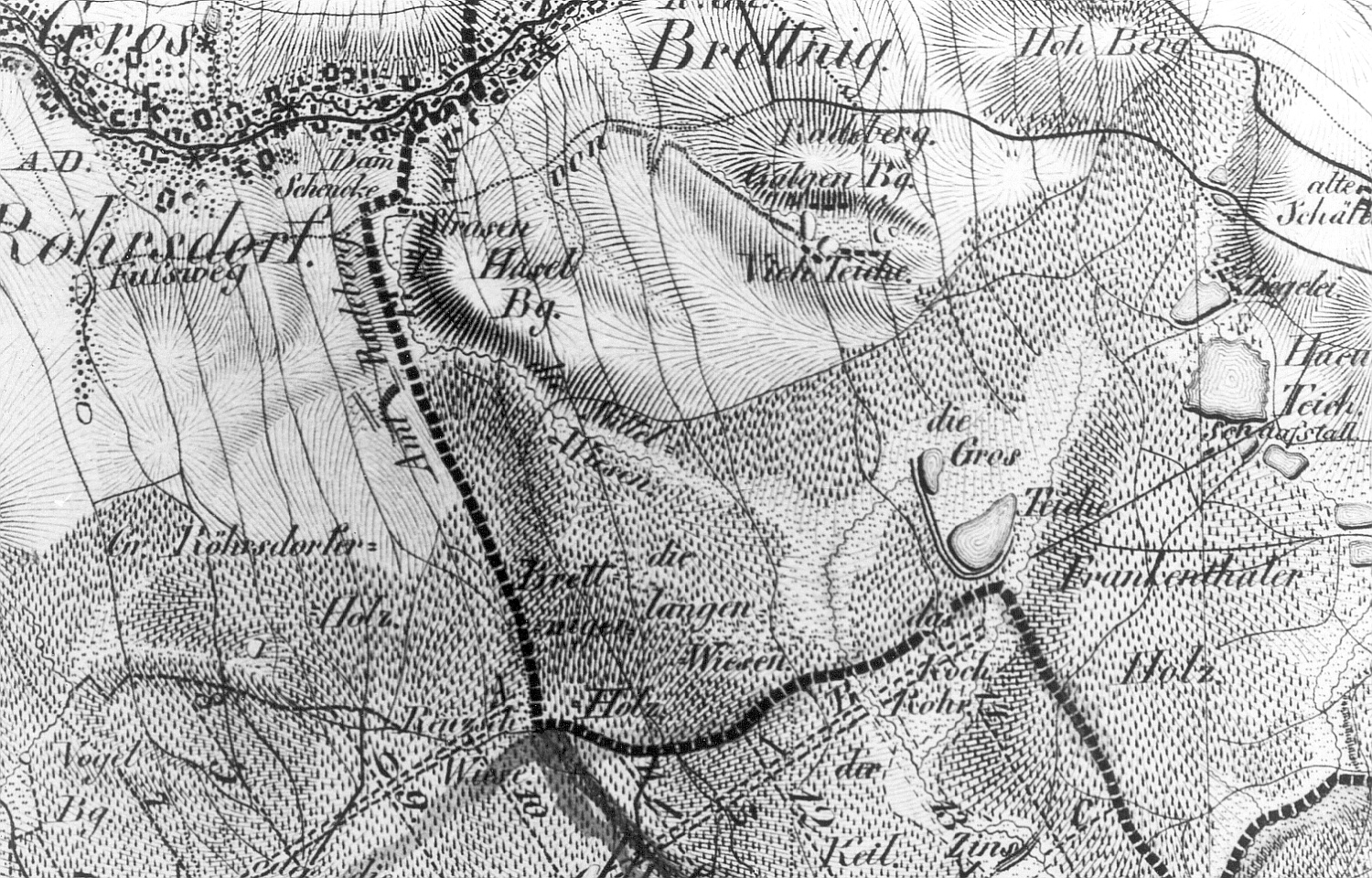 Original image description from the Deutsche Fotothek Bretnig-Hauswalde-Bretnig. Oberreit, Sect. Stolpen, 1821/22